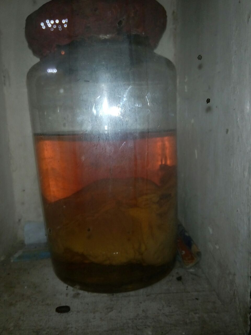 Detalle del fraco que contiene el corazón de Monseñor José Vicente de Unda, fallecido el 19 de Juio de 1840, cuyo último deseo fue que su corazón reposara en su ciudad natal, Guanare.